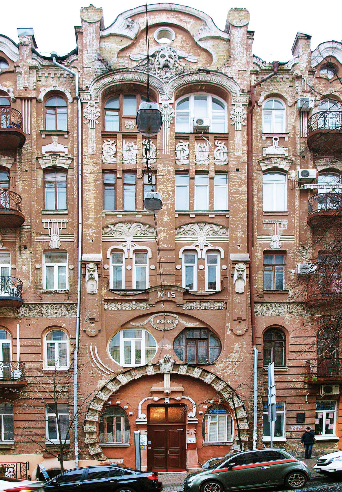 Будинок барона Гессельбейна. Київ, вул. Городецького, 15